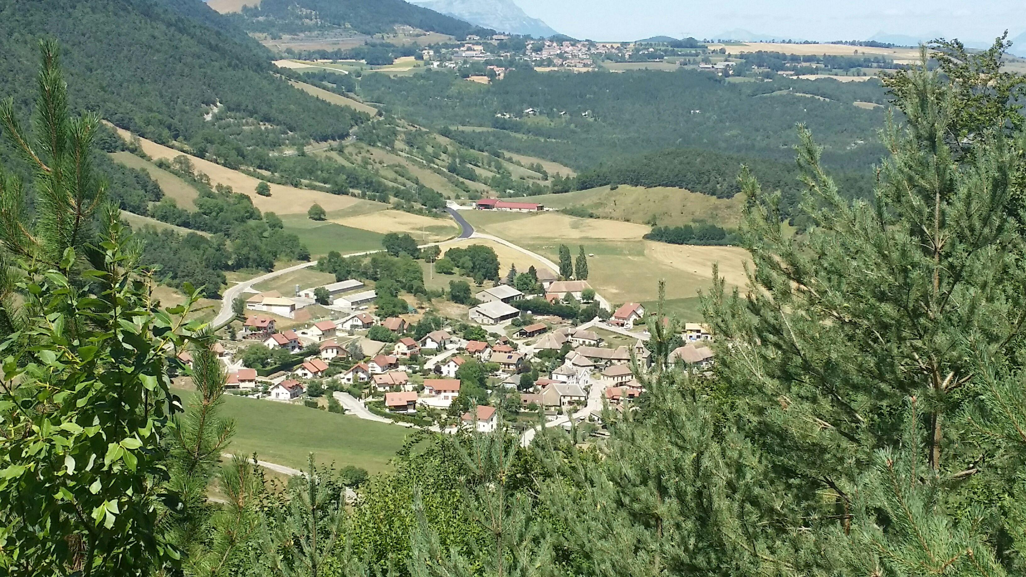 vue du village du haut d'une colline